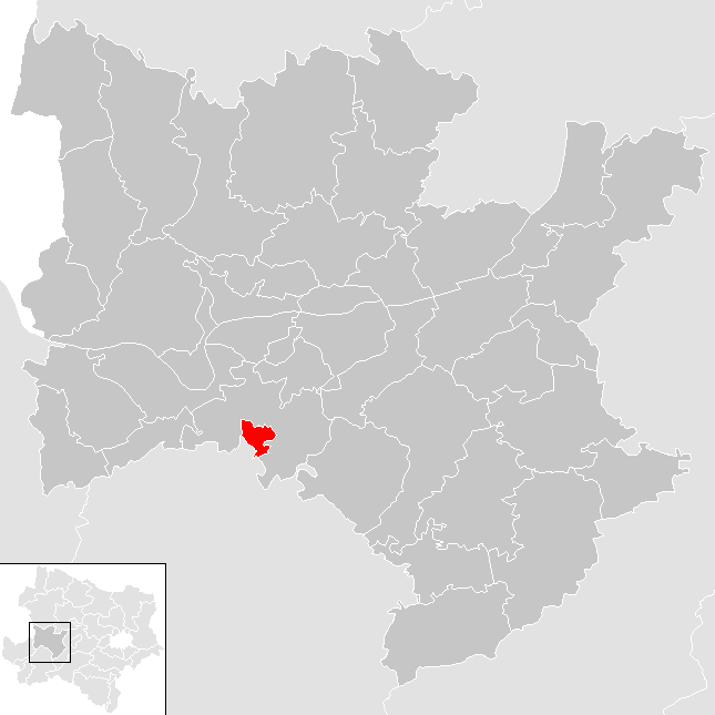 Bezirk Melk